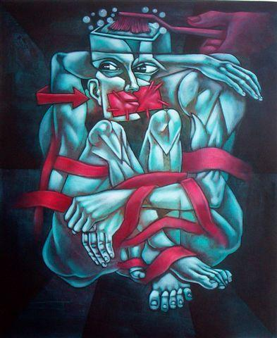 Pintura Político-social